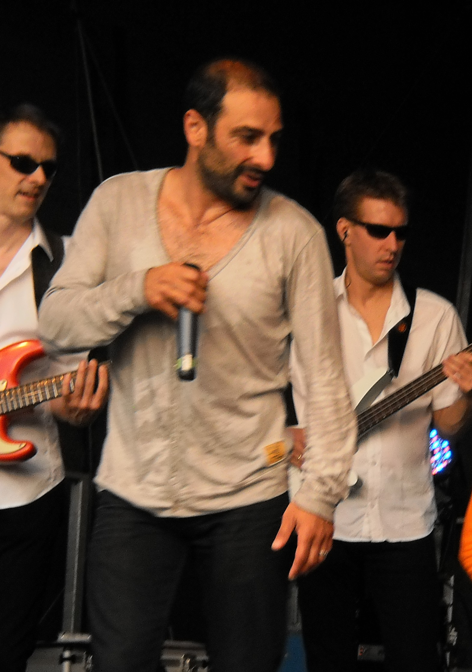 Volkan Baydar mit Blue-Café (the band) am 17.08.2013 in Neumünster